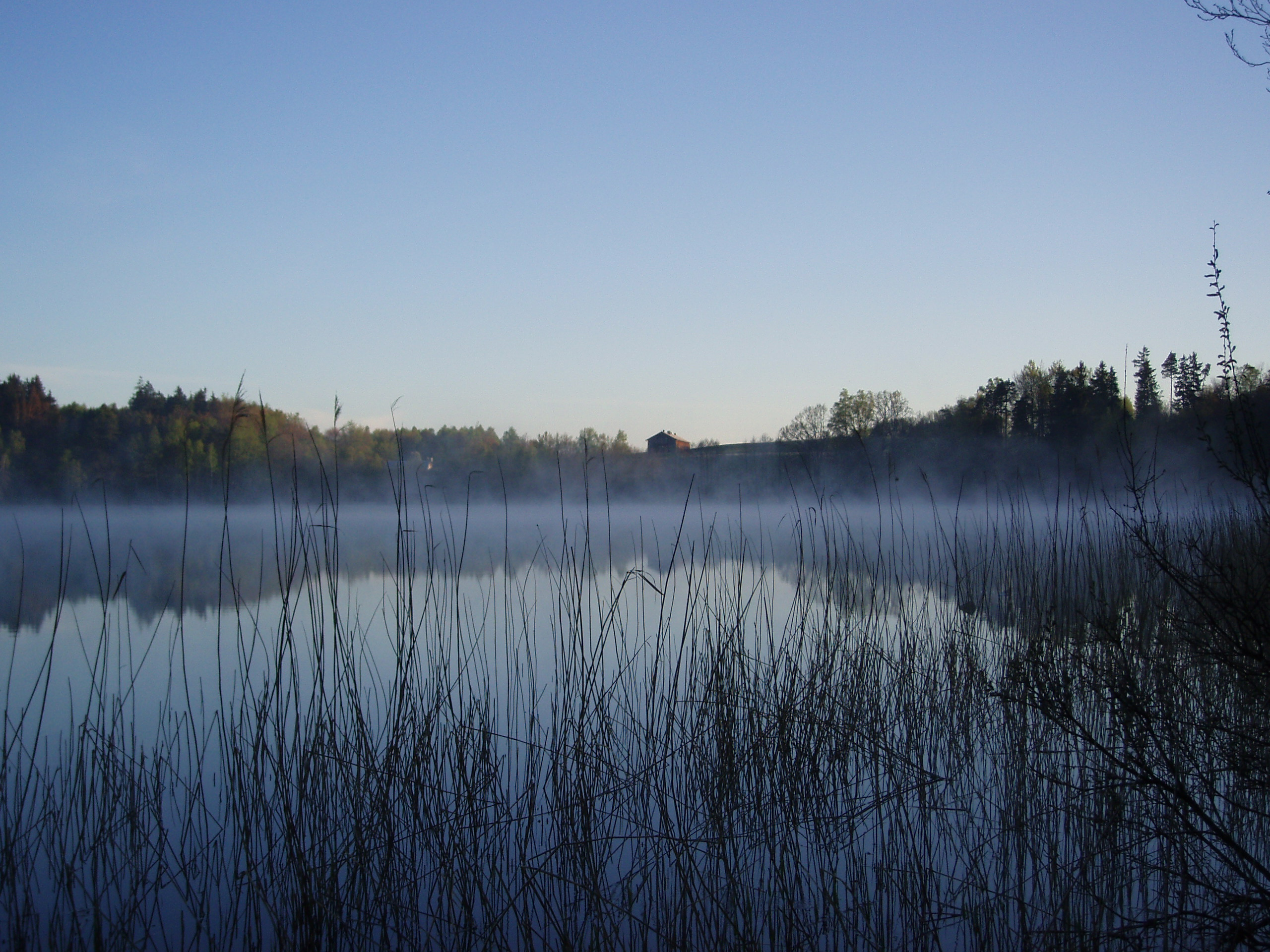 Gleboczek Lake, Jezioro Głęboczek k. Bytowa